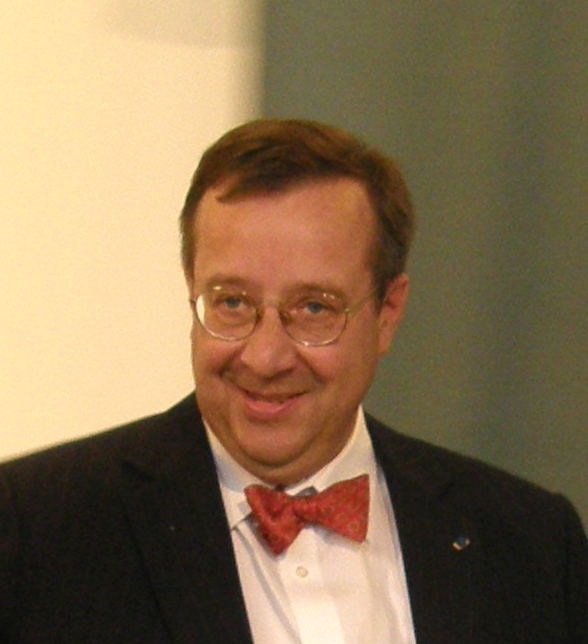 Toomas Hendrik Ilves